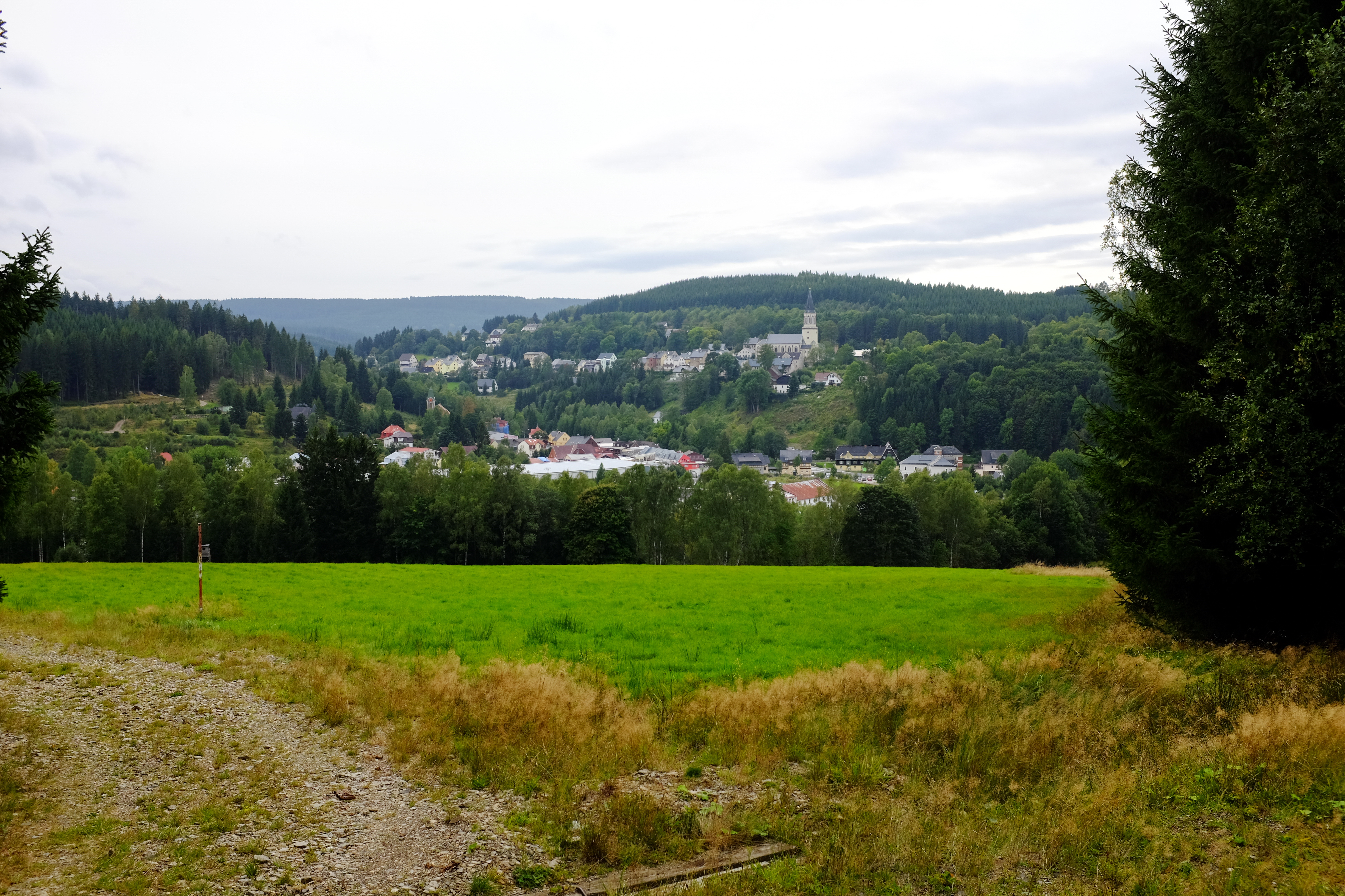 Johanngeorgenstadt od Potůčků, Krušné hory